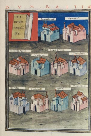 Dux Raetiae from Notitia dignitatum